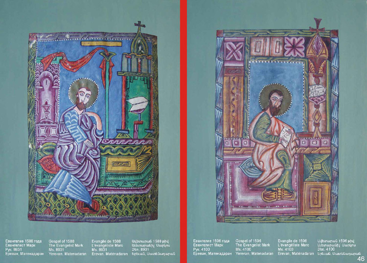 Առաքել Գեղամեցի